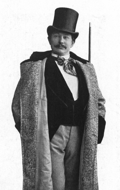 Hanns Fischer im Stück "Fuhrmann Henschel" von Gerhart Hauptmann am Deutschen Theater Berlin